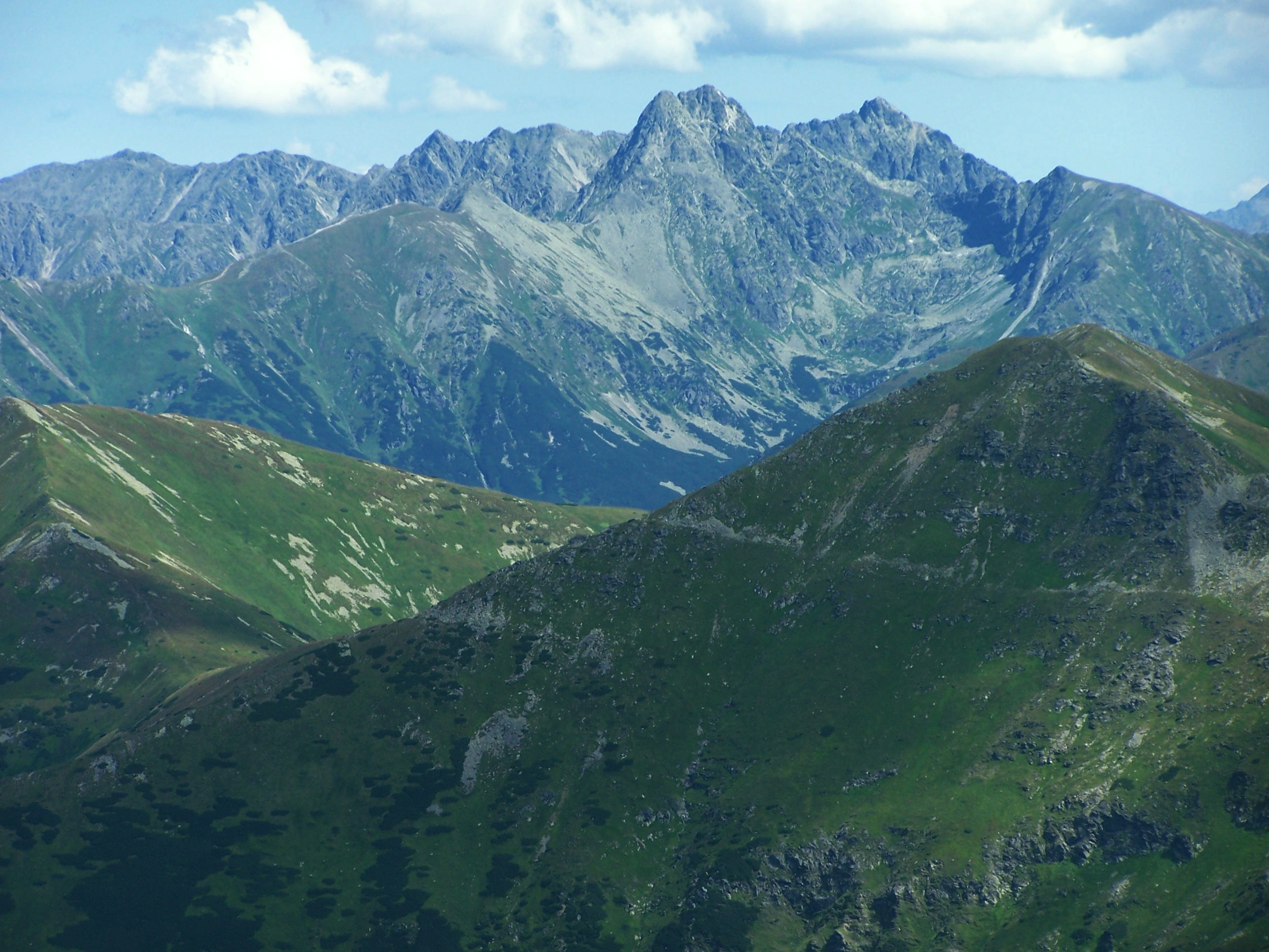 Smreczyński Wierch (Tatra Mountains)